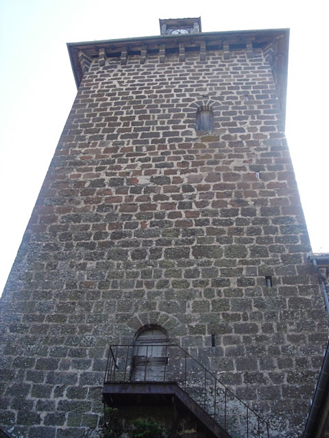 Tour de Saint-Simon (15)